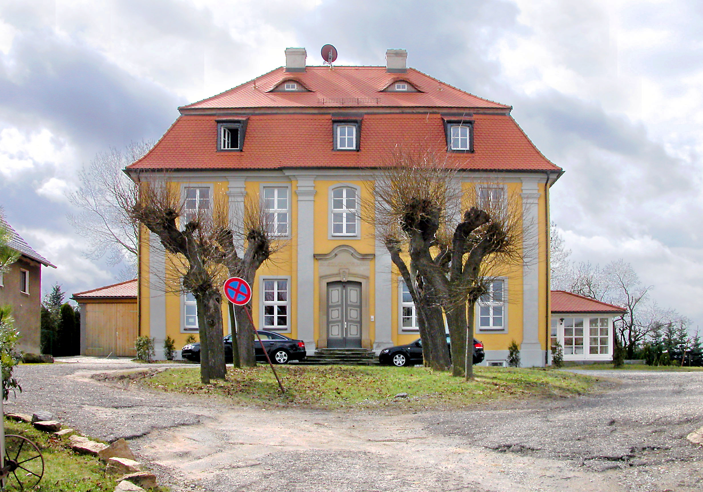 01.04.2006 01906 Pannewitz (Burkau), Am Schloß 2: Das barocke Herrenhaus (GMP: 51.198588,14.246190) wurde um 1750 für Johann Heinrich Simonis errichtet. Heute Mietwohnungen. Hofseite, Sicht von Norden. [DSCN9245.TIF]20060401030DR.JPG(c)Blobelt